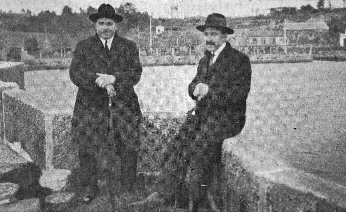 José Martínez Pereiro e José Más, fotografía en Vida Gallega 1927